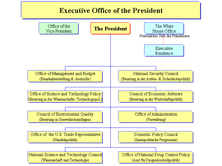 Titel: Executive Office of the President (USA)